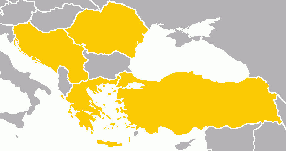 Balkan Treaty